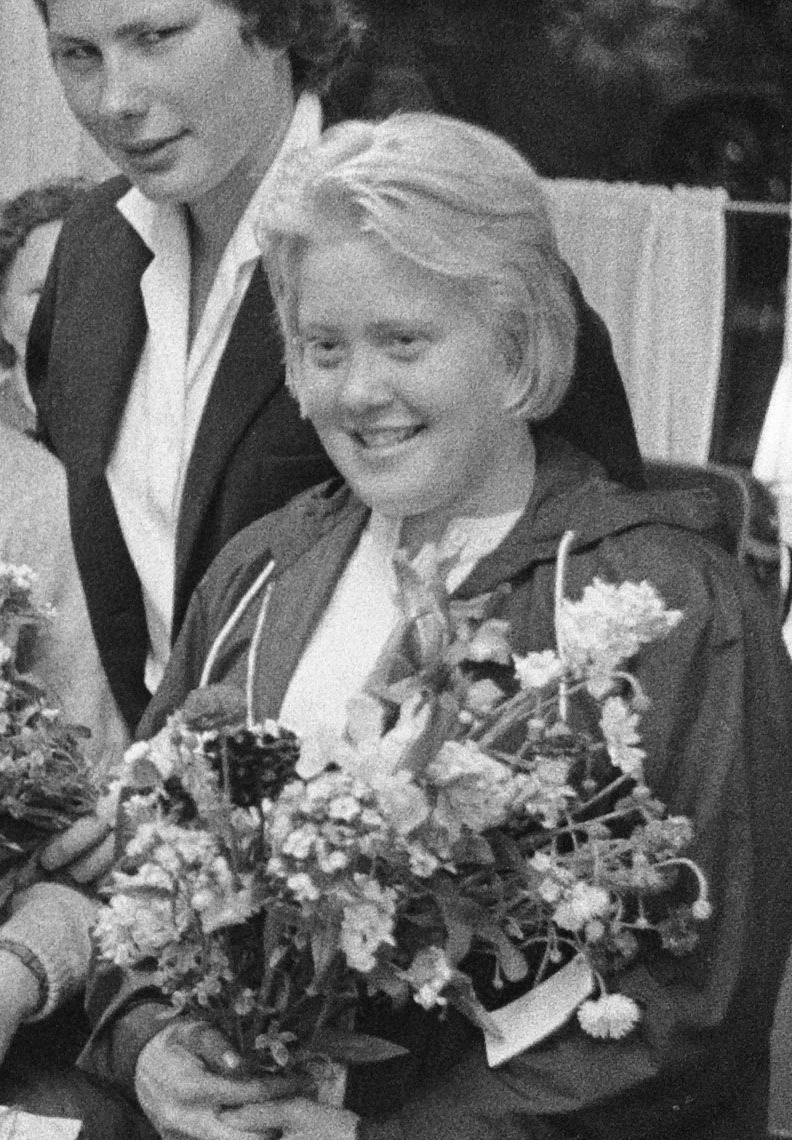 Atie Voorbij